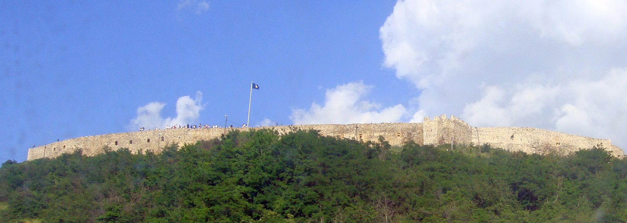 Srpskohrvatski / српскохрватски: Stara tvrđava Kaljaja, Prizren.